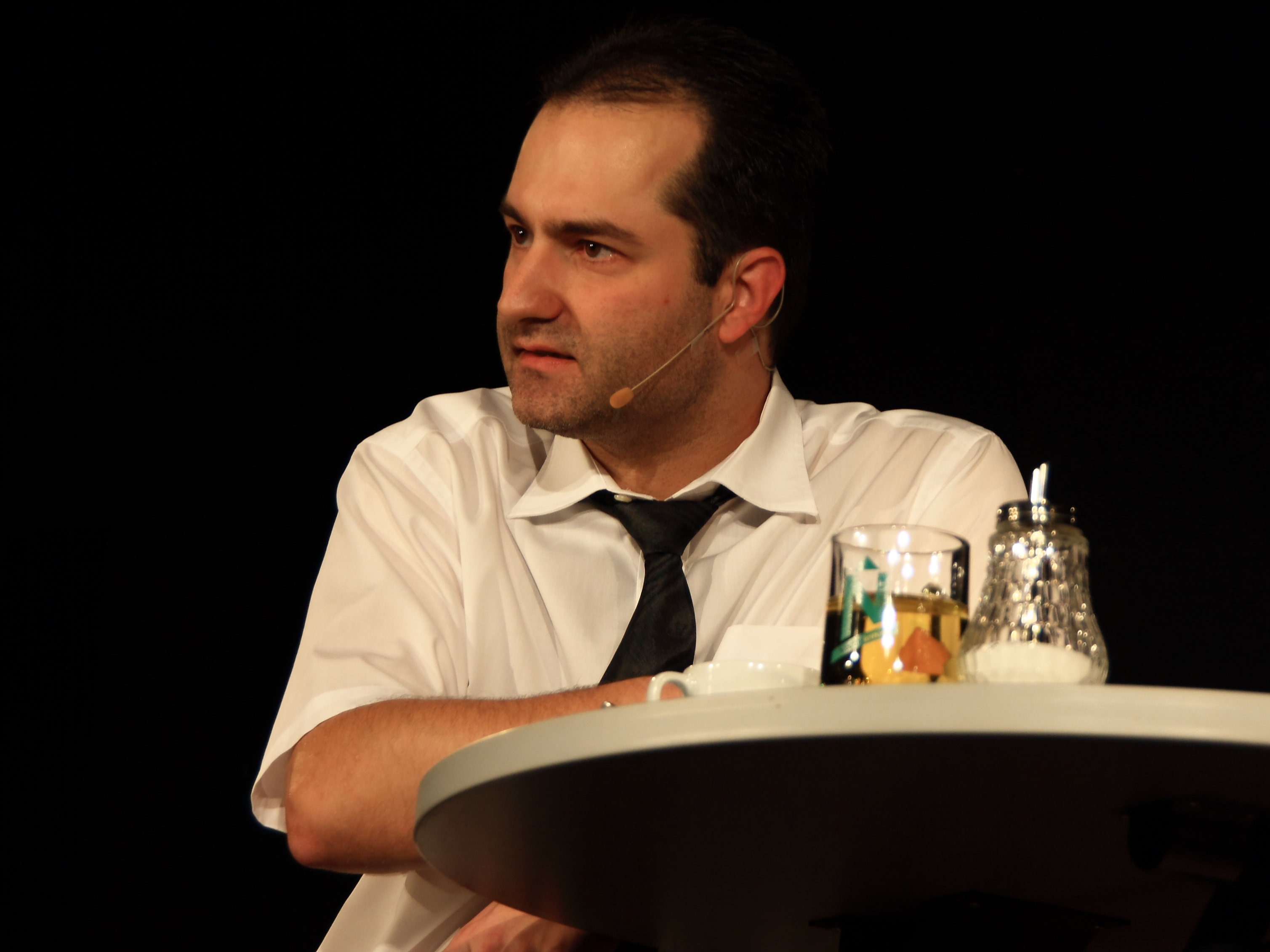 Stefan Walz aka Gerd Ferz ist ein hohenlohischer Kabarettist. Hier mit dem Programm Auszeit bei einem Auftritt im KULT, Niederstetten.